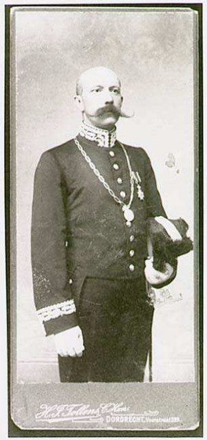 Mens, P. H. van, in 1910